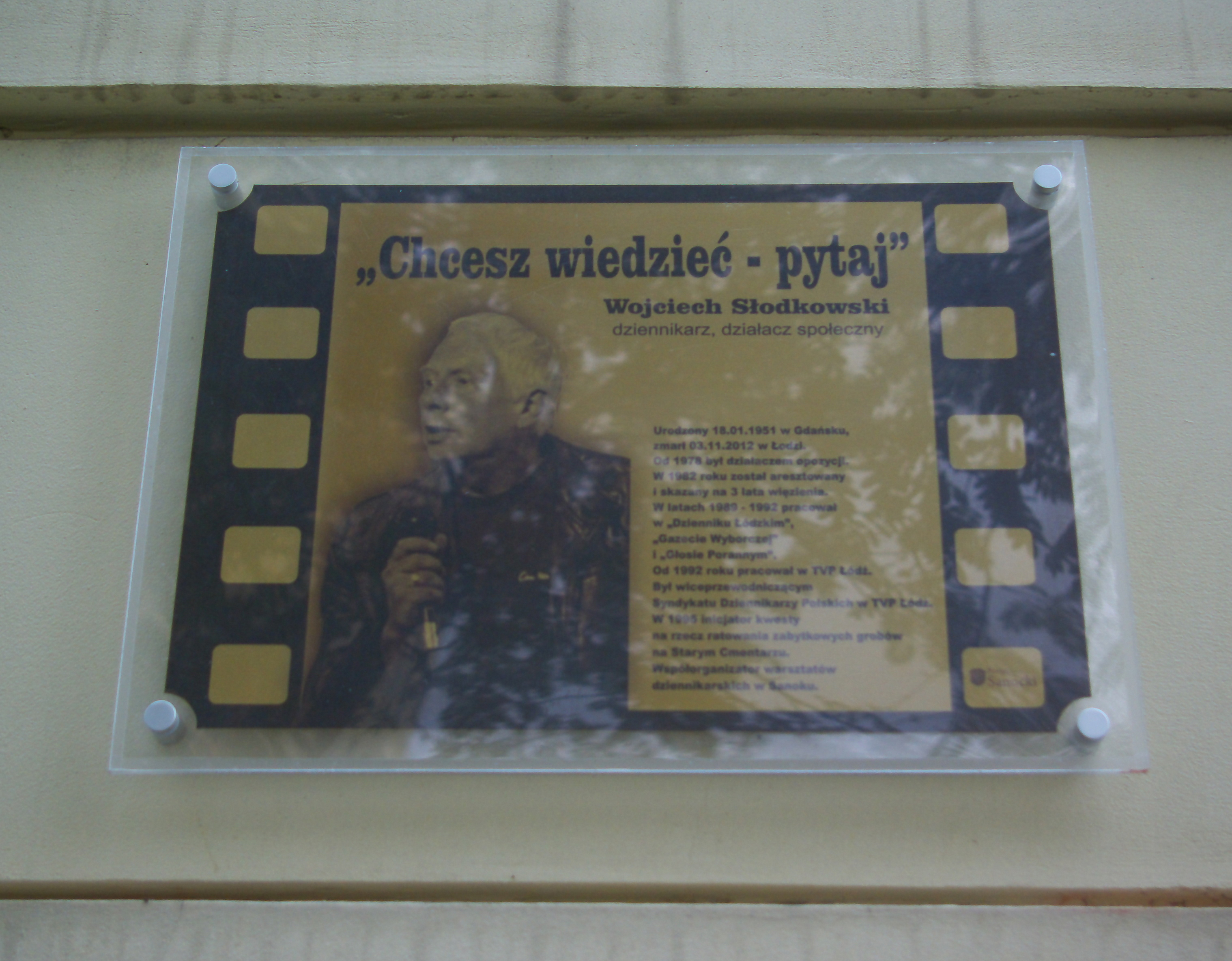 Tablica poświęcona Wojciechowi Sklodkowskiemu na budynku II LO w Sanoku